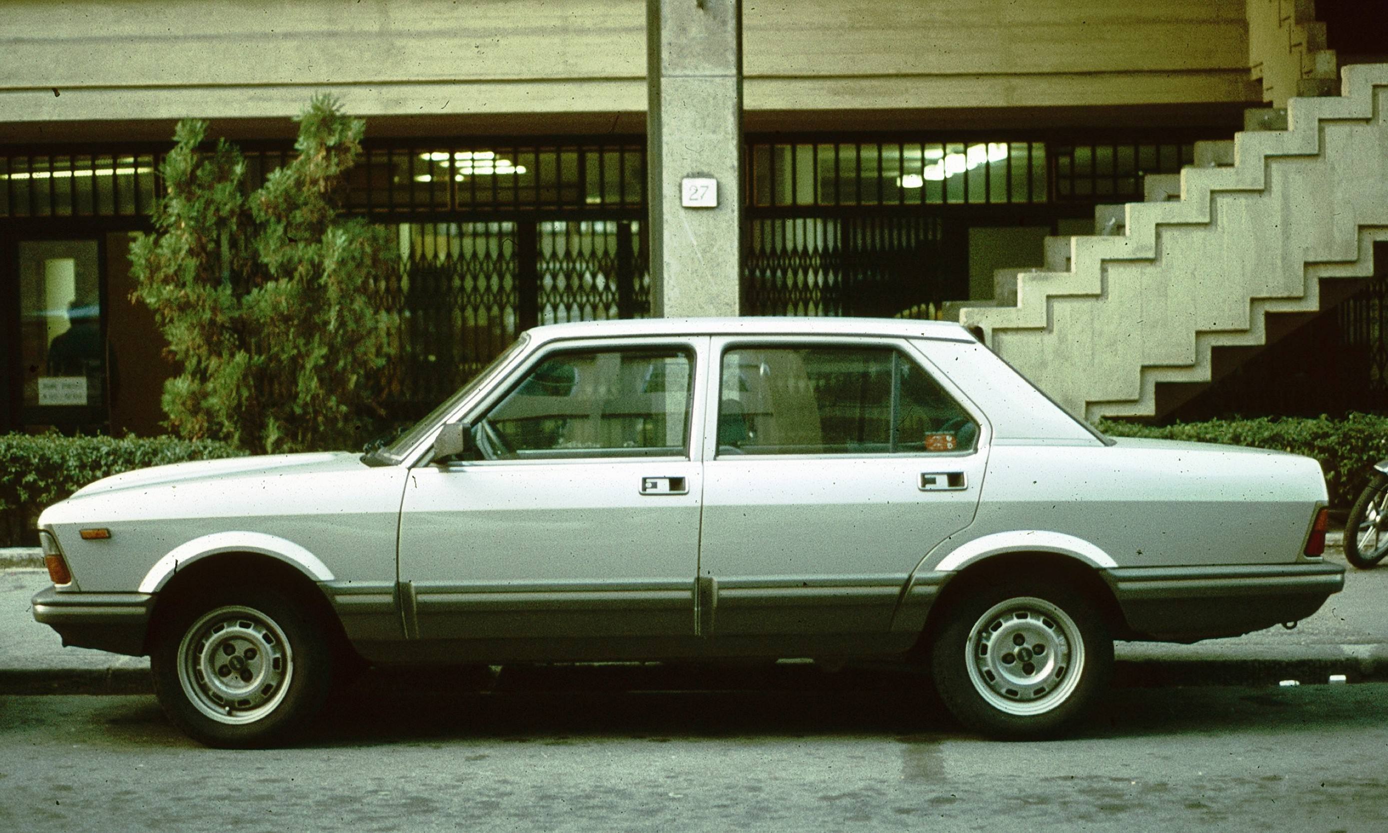 Fiat Argenta Diesel 1982